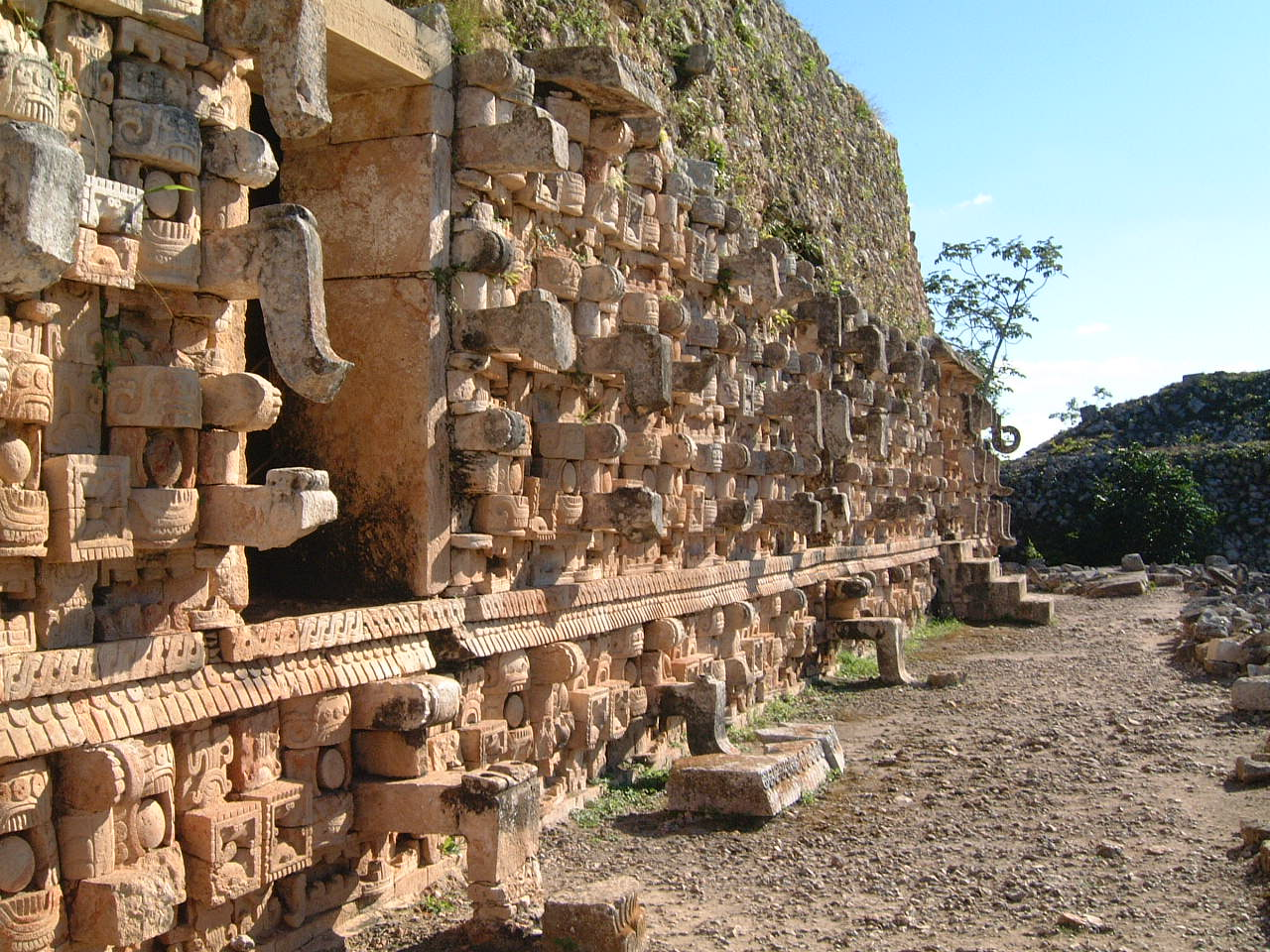 Codz Poop Kabah Yucatan Mexico